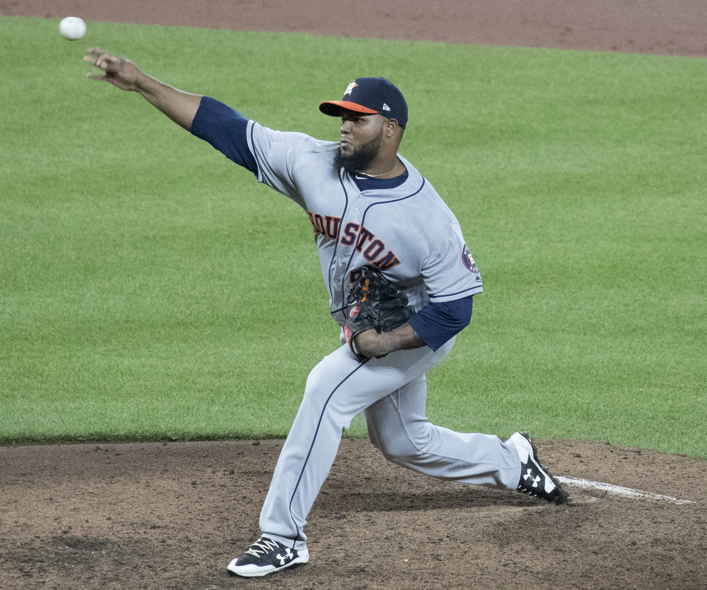 Astros at Orioles 7/22/17